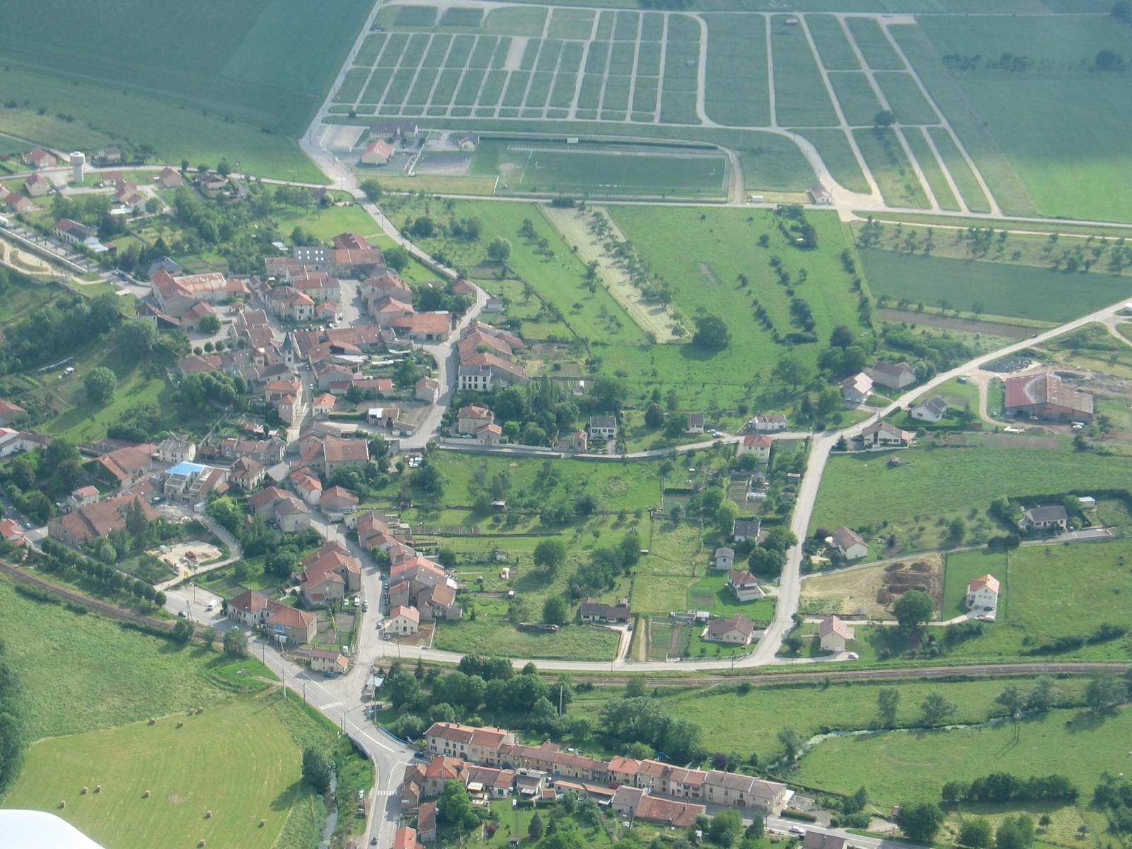 Vue aérienne sur la partie bourg de Poussay avec le champ de foire en arrière plan.